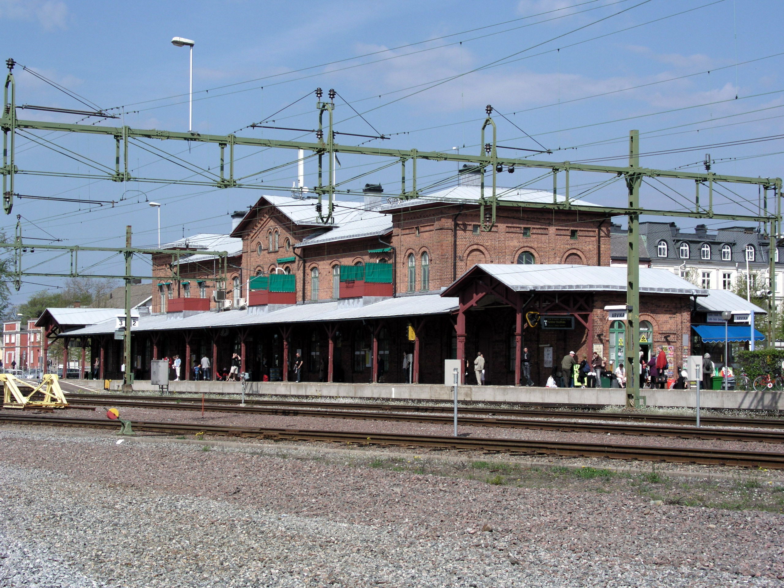 Arvika, Sweden. Arvika järnvägsstation, view.